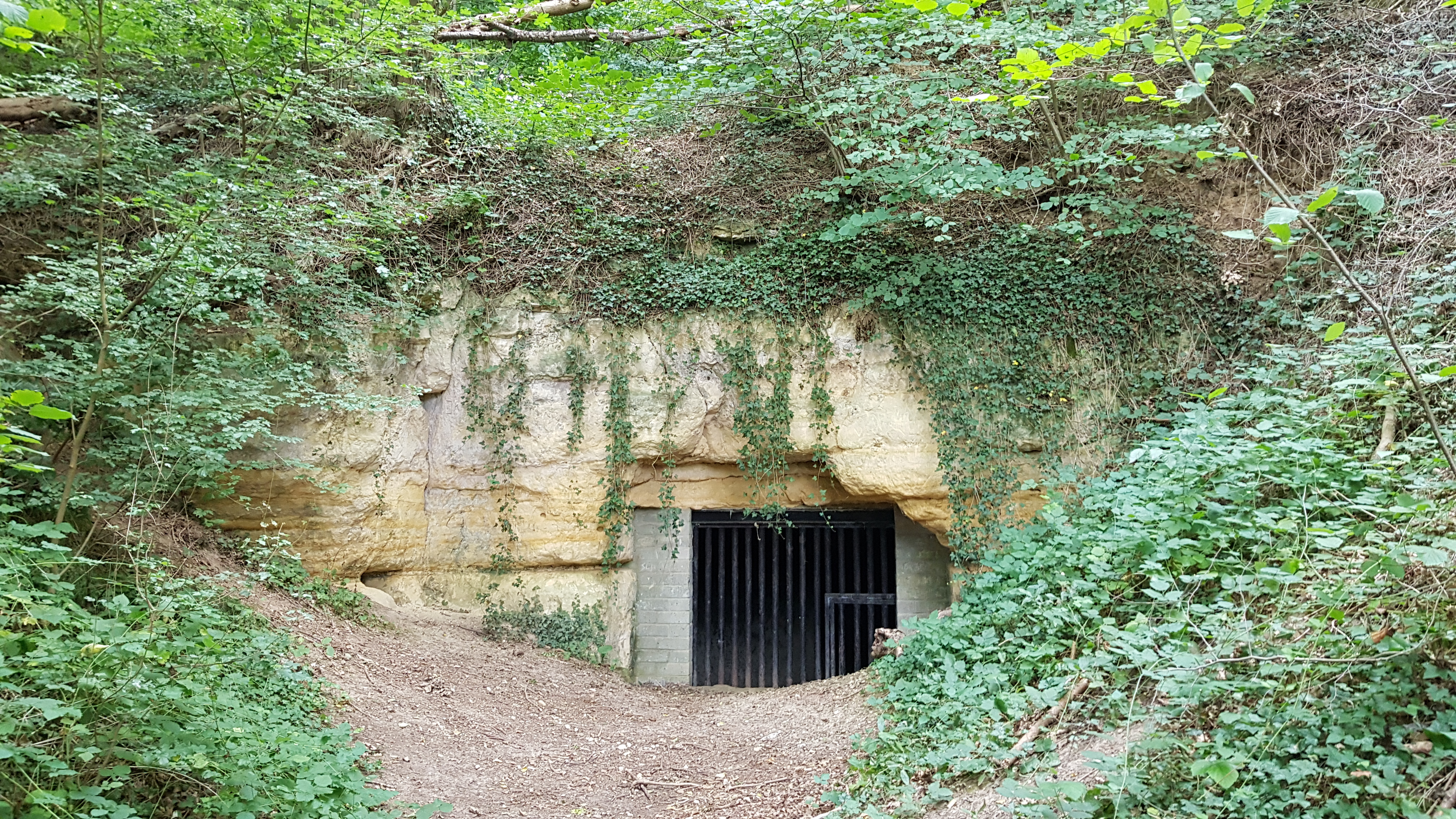 Steinberggroeve in Savelsbos, Rijckholt, Nederland